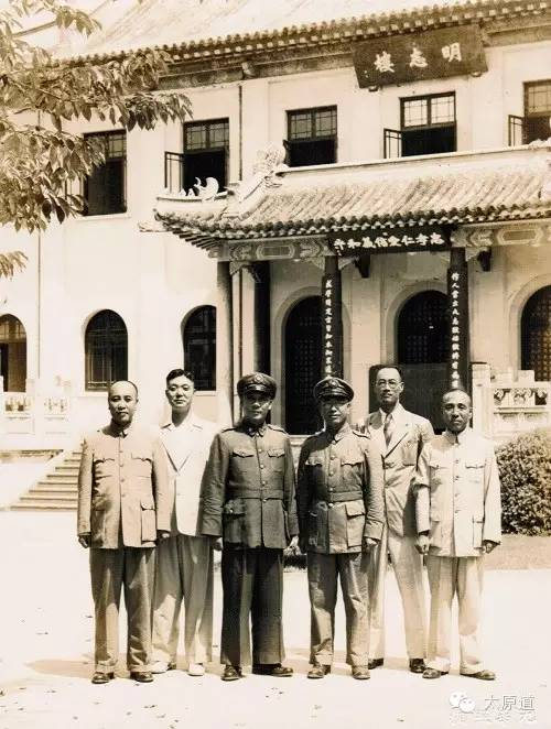 1948年在南京参加国民大会的梁化之。